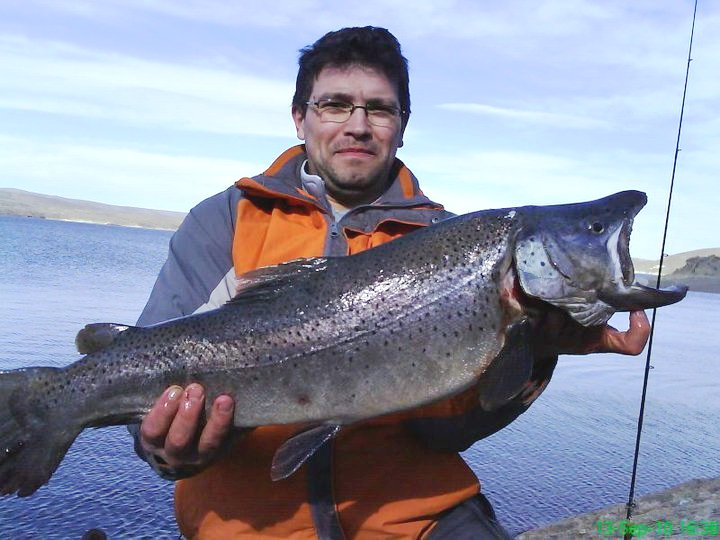 Pesca del salmón del pacífico en alrededores del departamento Huiliches